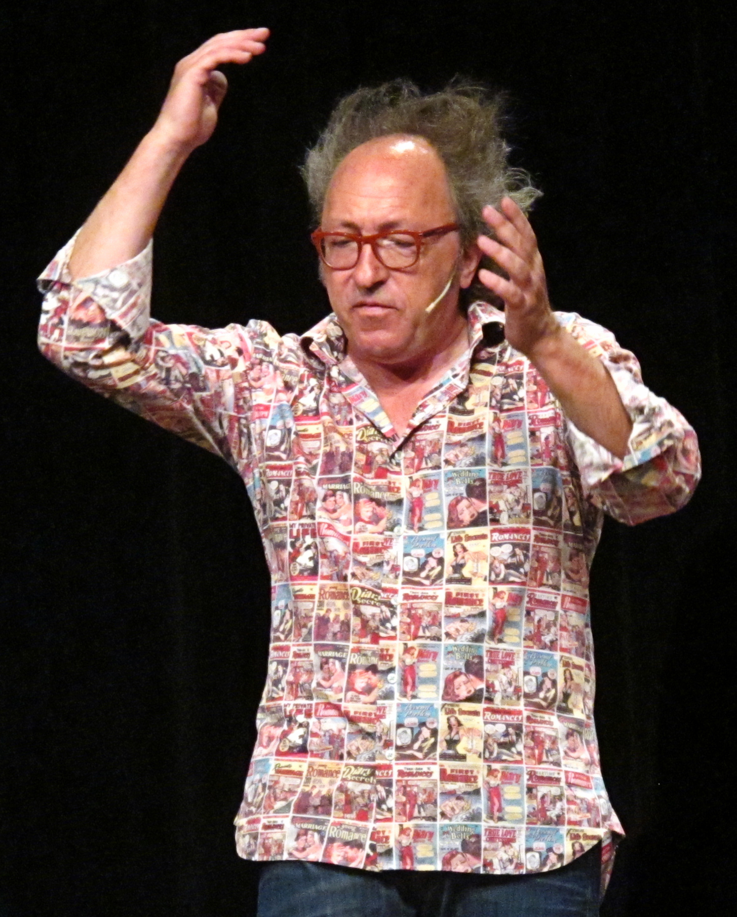 Urban Priol, deutscher Kabarettist, April 2011, Lustspielhaus München, Programm: Wie im Film.